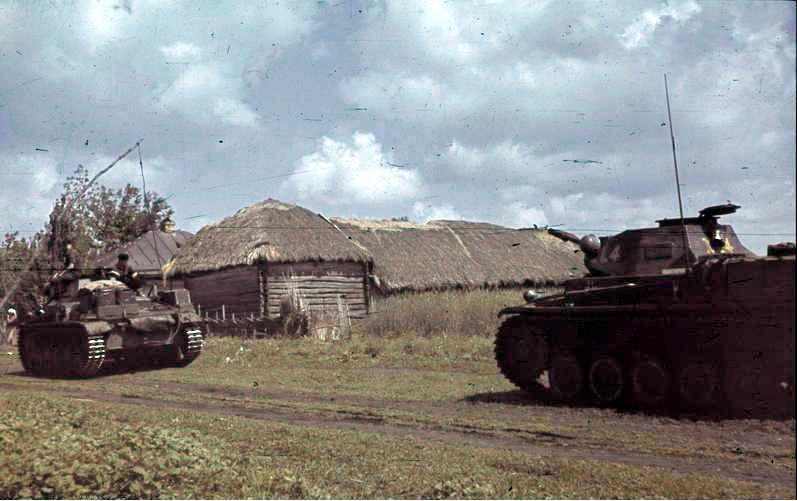 Deutsche Panzer in Bereitschaft in einem Dorf der Kalmücken